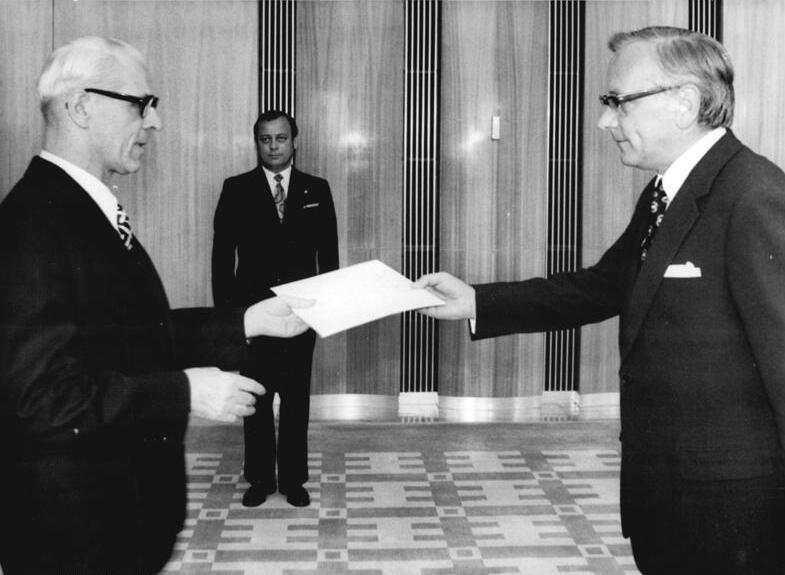 ADN-ZB Spremberg 20.6.1974 Berlin: Leiter der Ständigen Vertretung der BRD akkreditiert Der Vorsitzende des Staatsrates der DDR, Willi Stoph (l.), empfing am 20.6.1974 den Leiter der Ständigen Vertretung der BRD in der DDR, Günter Gaus (r.), zur Entgegennahme seines Beglaubigungsschreibens.